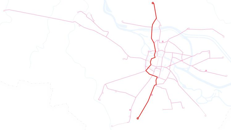 Poglądowa mapka przebiegu linii tramwajowej 15 we Wrocławiu.